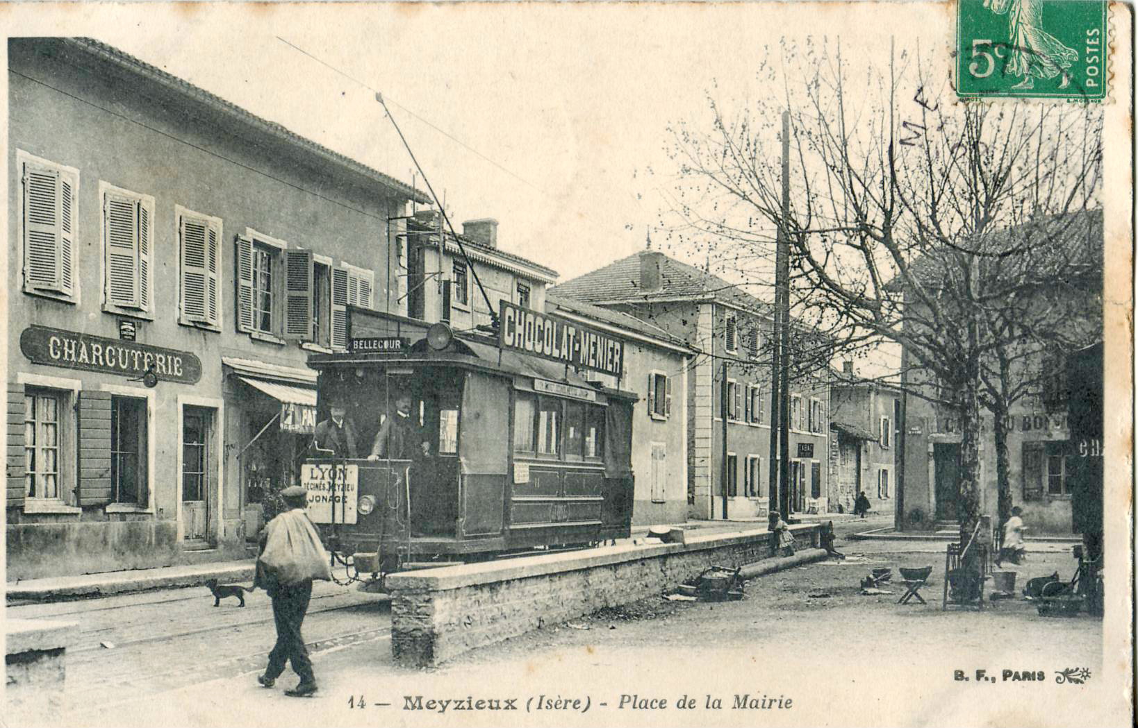 Carte postale ancienne éditée par BF à Paris, n°14 :MEYZIEU - Place de la Mairie.